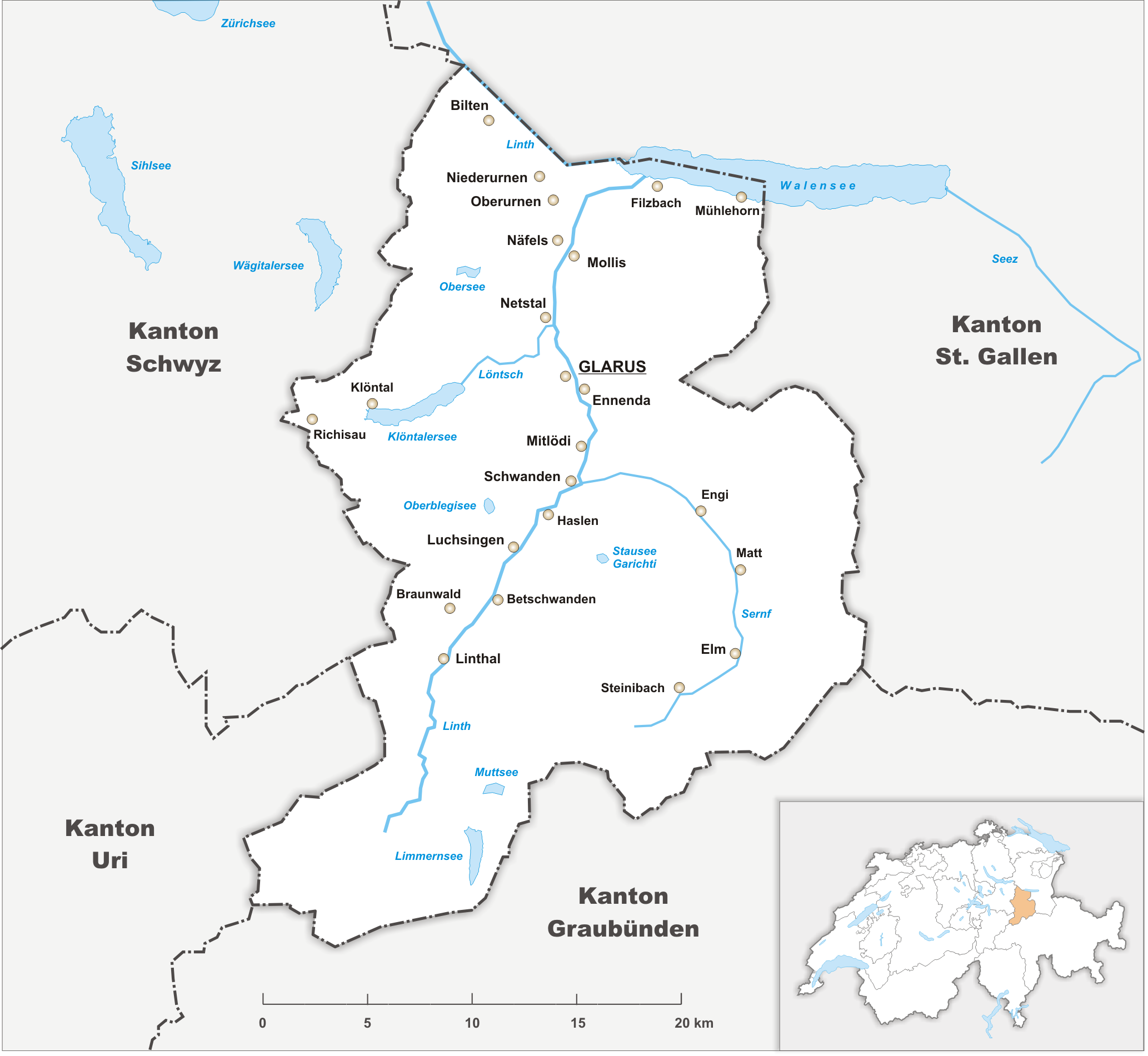 Karte des Kanton Glarus.